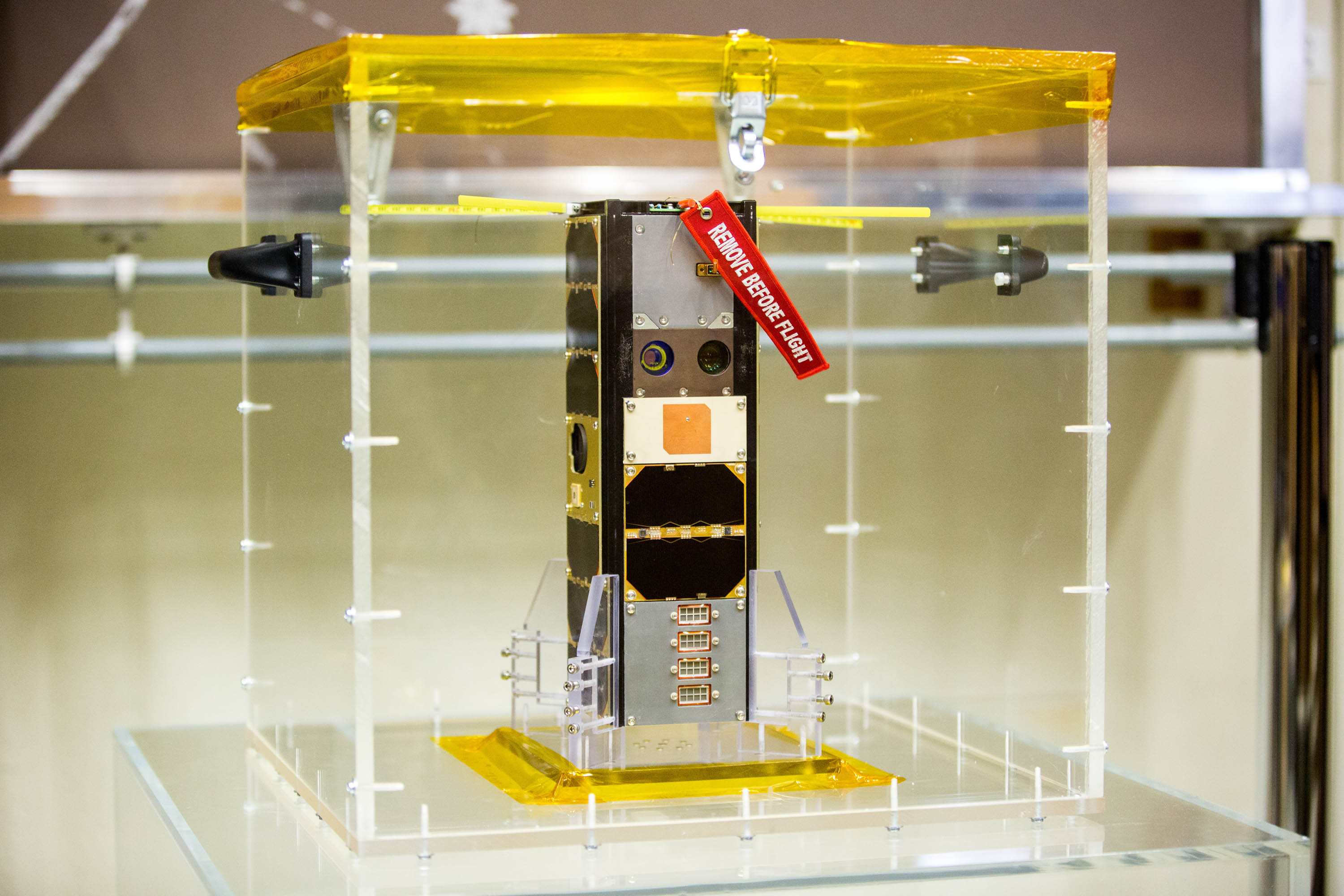 Aalto-1-satelliitin lentomalli